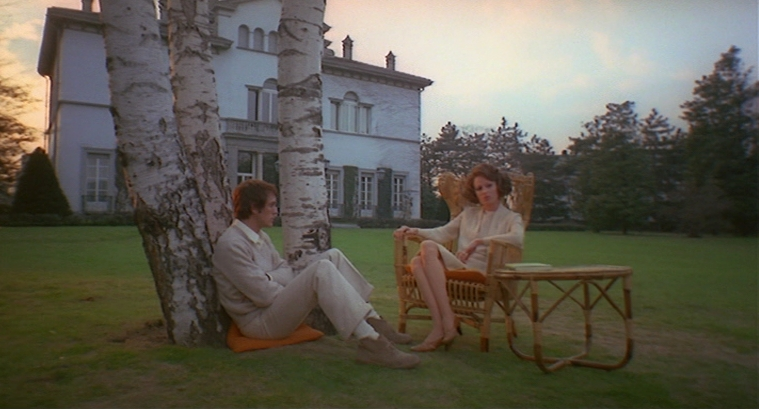 Screenshot del film Teorema diretto da Pier Paolo Pasolini (1968)